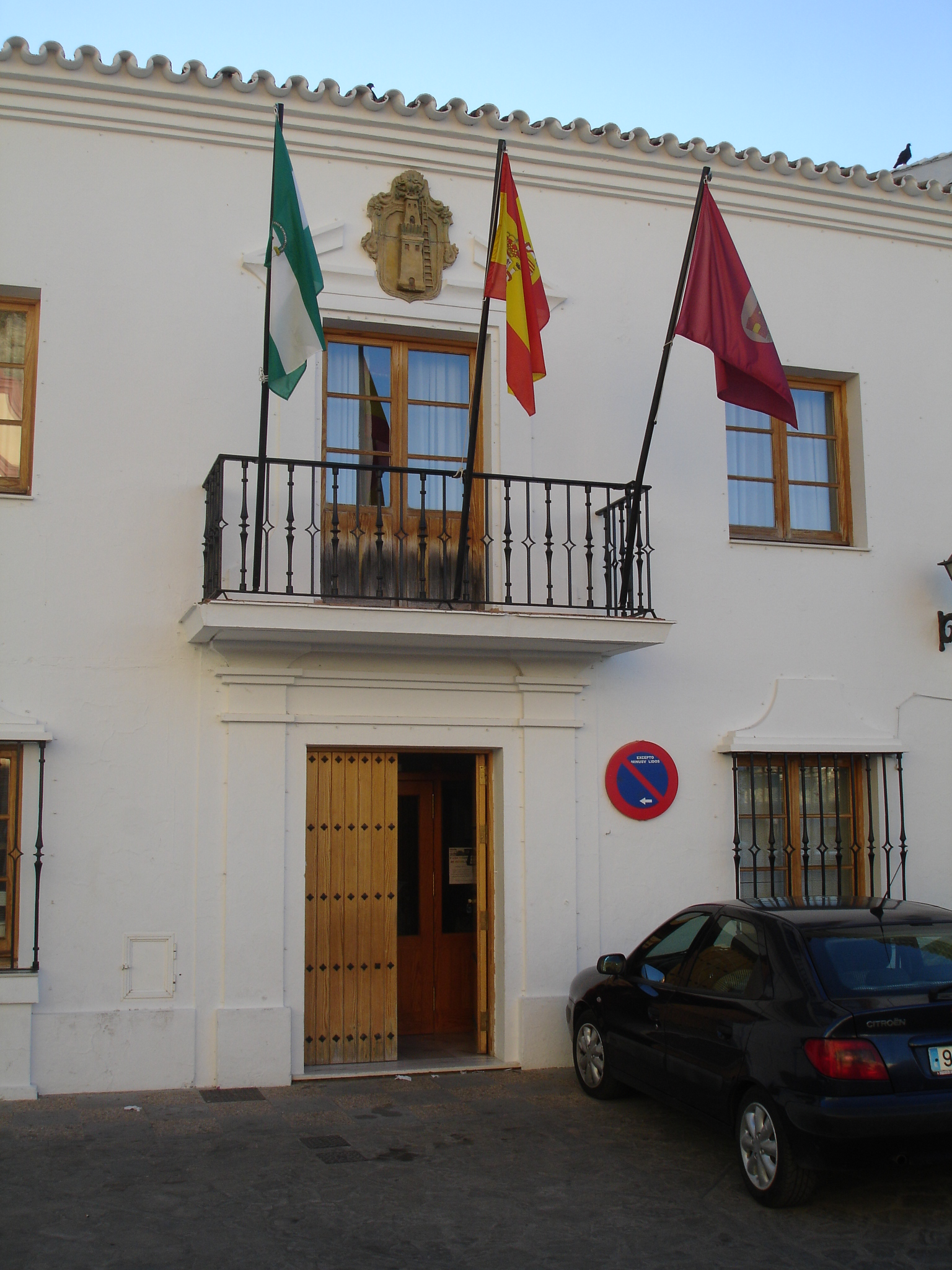 Zahara de la Sierra town hall. Andalusia, Spain